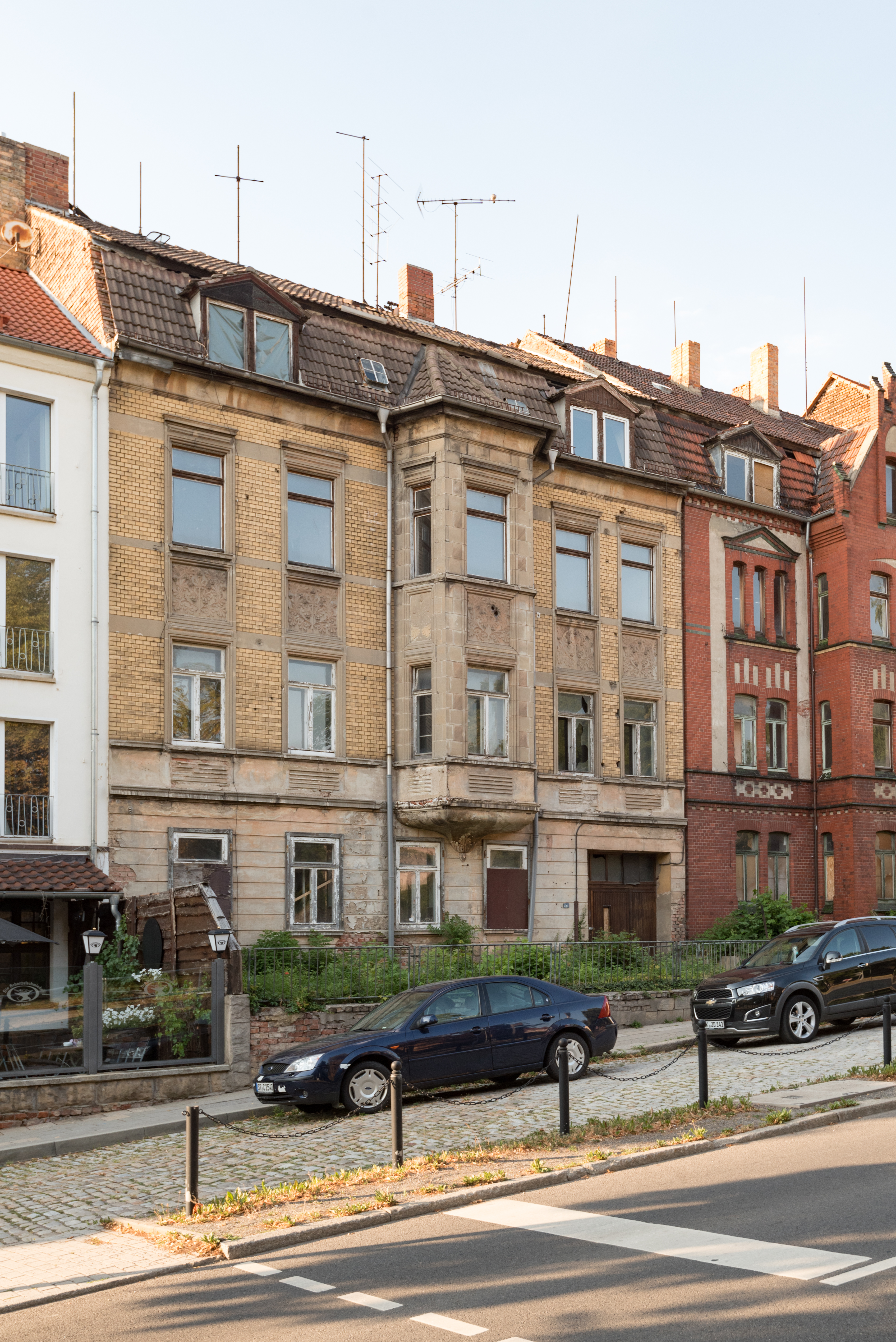 Weißenfels, Zeitzer Straße 26